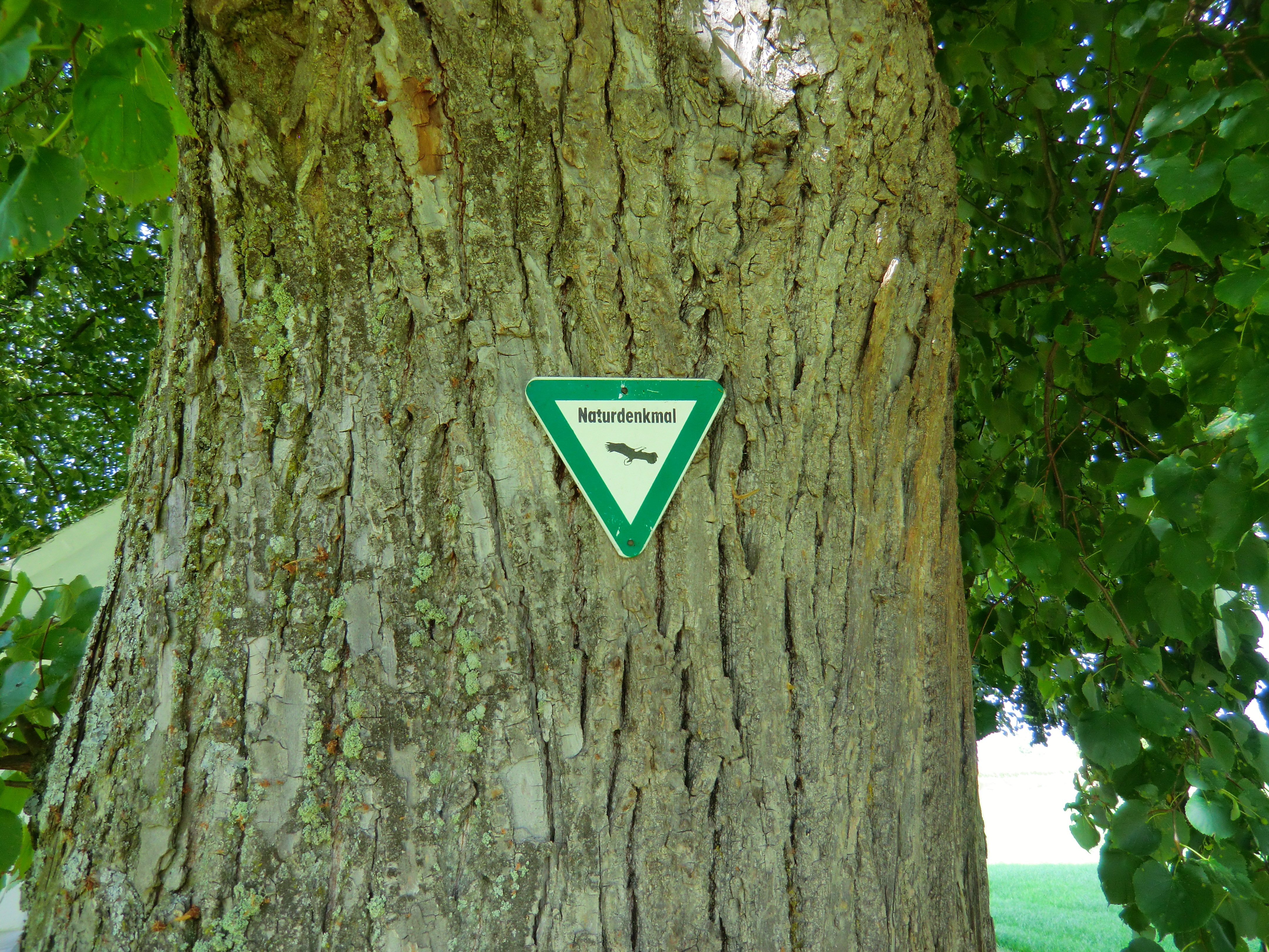 Linden am Gemeindeplatz Edenbergen, Naturdenkmal-Schild